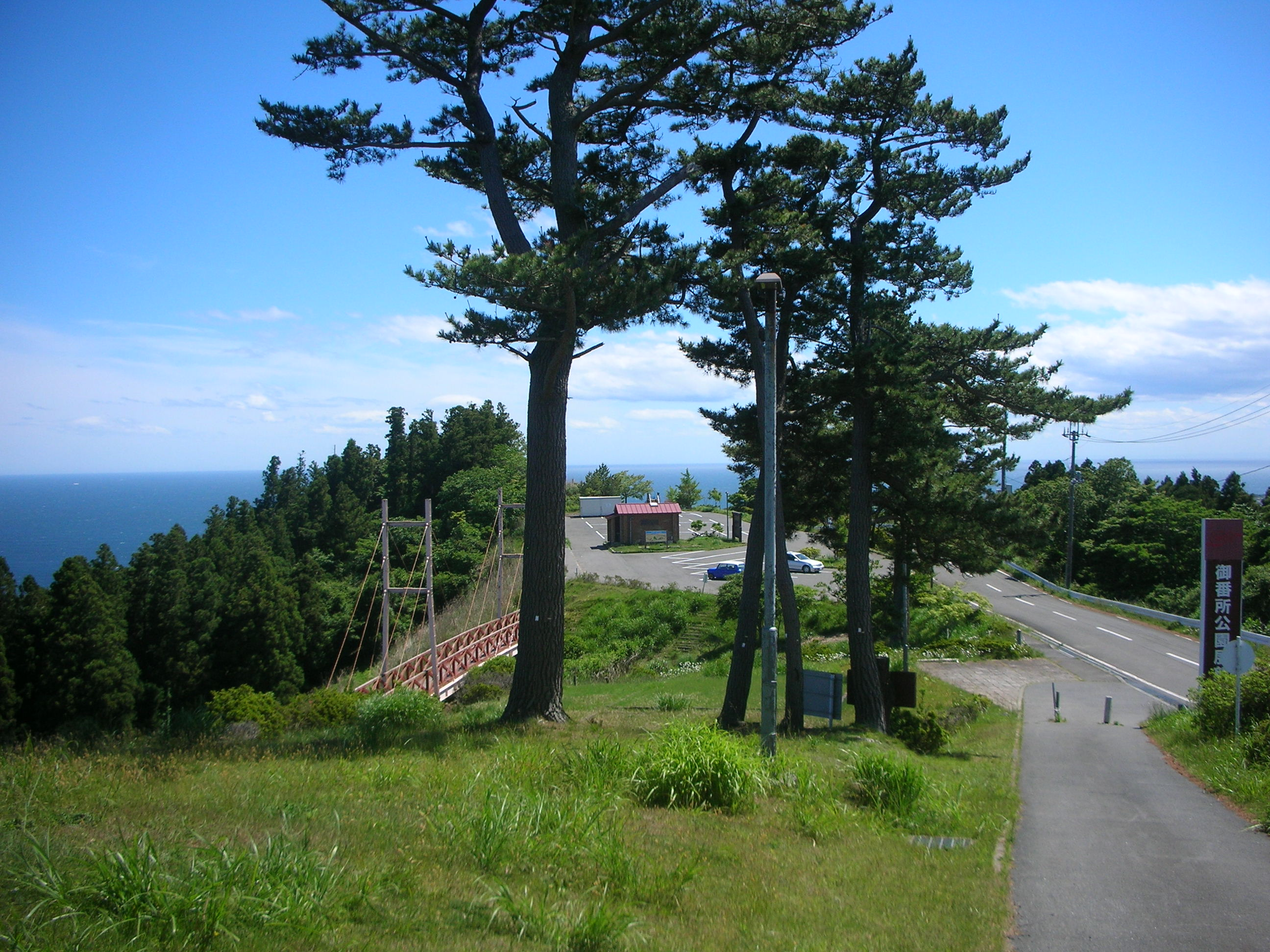 おしか御番所公園